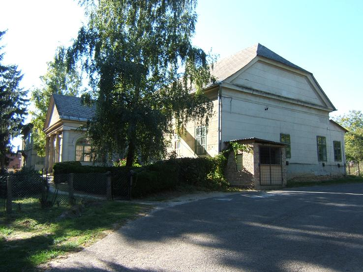 A szentgáloskéri kastély (Somogy) This is a photo of a monument in Hungary, Identifier: -7487